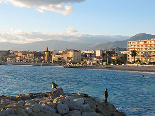 Photo du Cros-de-Cagnes, zone littorale de la commune de Cagnes/Mer (06)